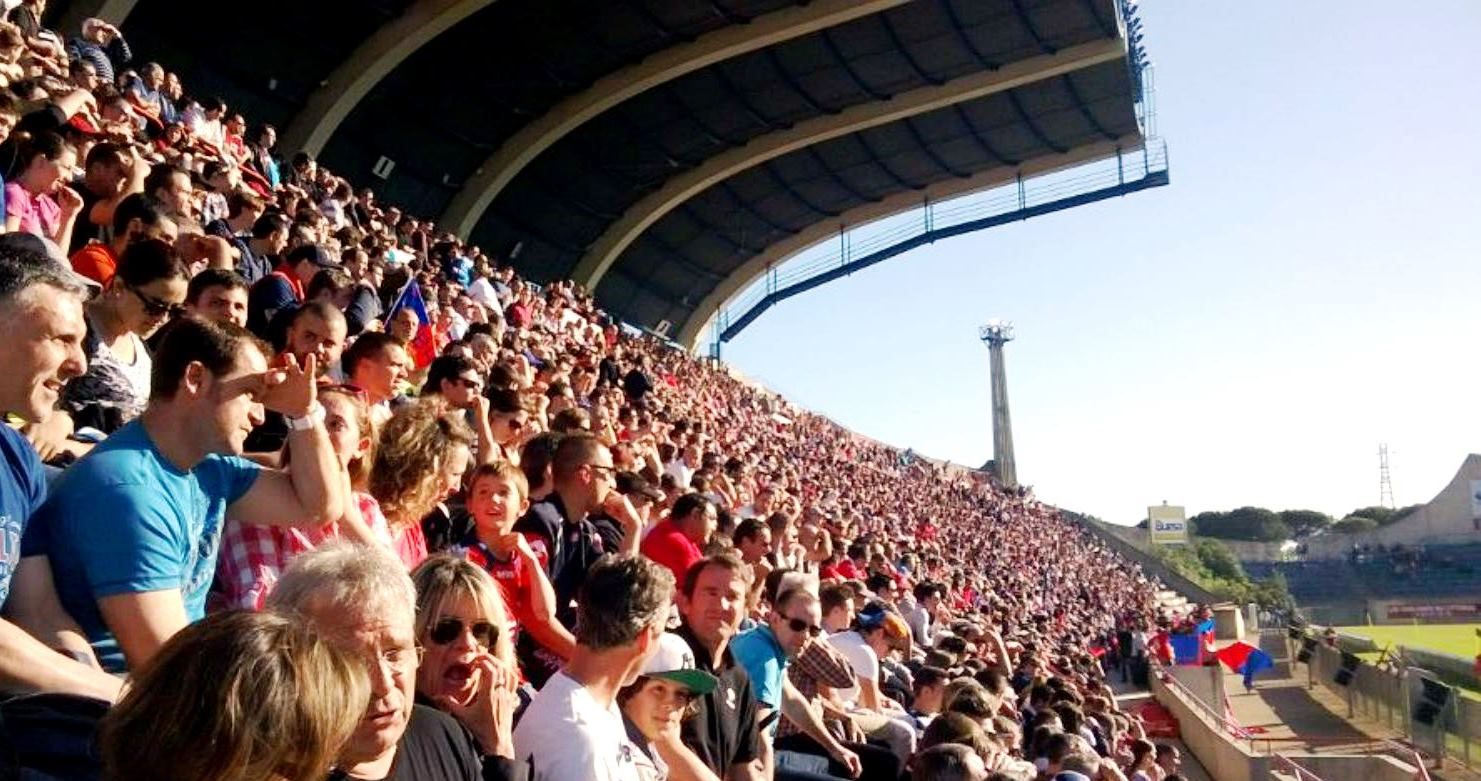 Tribune de Face du Stade de la Méditerranée lors du match à rejouer AS Béziers Hérault - RC Massy Essonne le 01/05/2013 en Pro D2 (plus de 12 000 spectateurs).